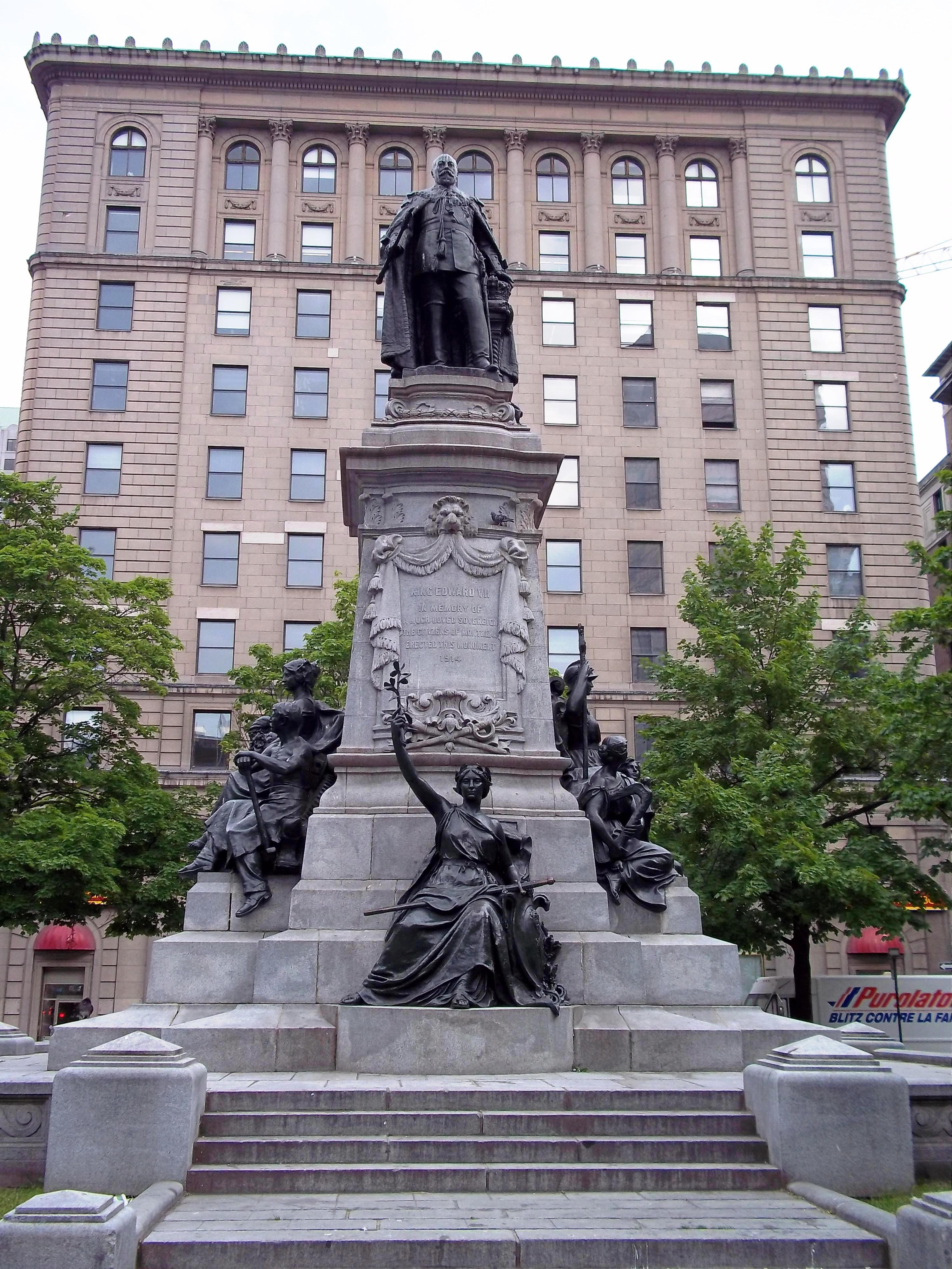 Monument à Édouard VII, square Phillips, Montréal